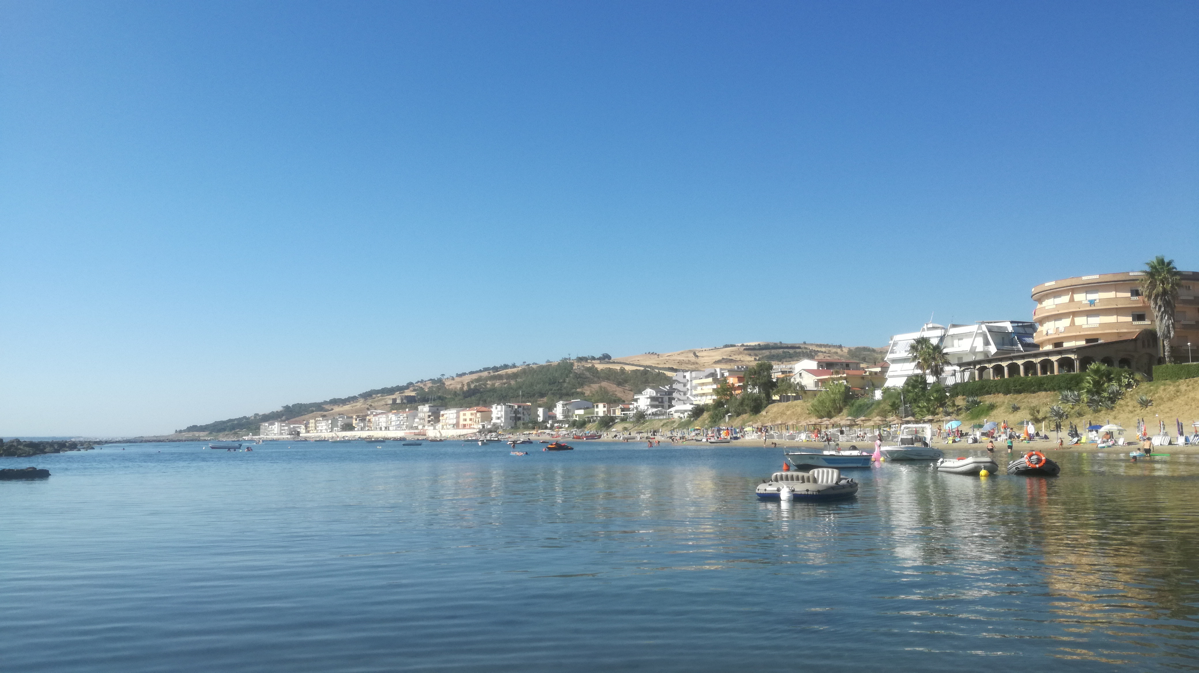 Torre Melissa nel 2019